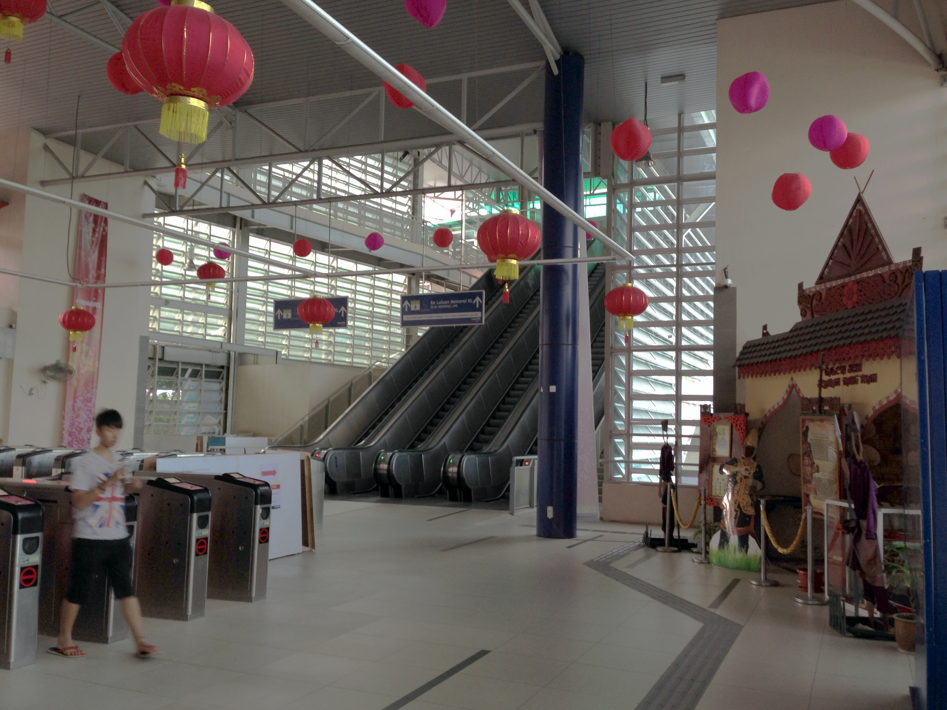 inside hang tuah station